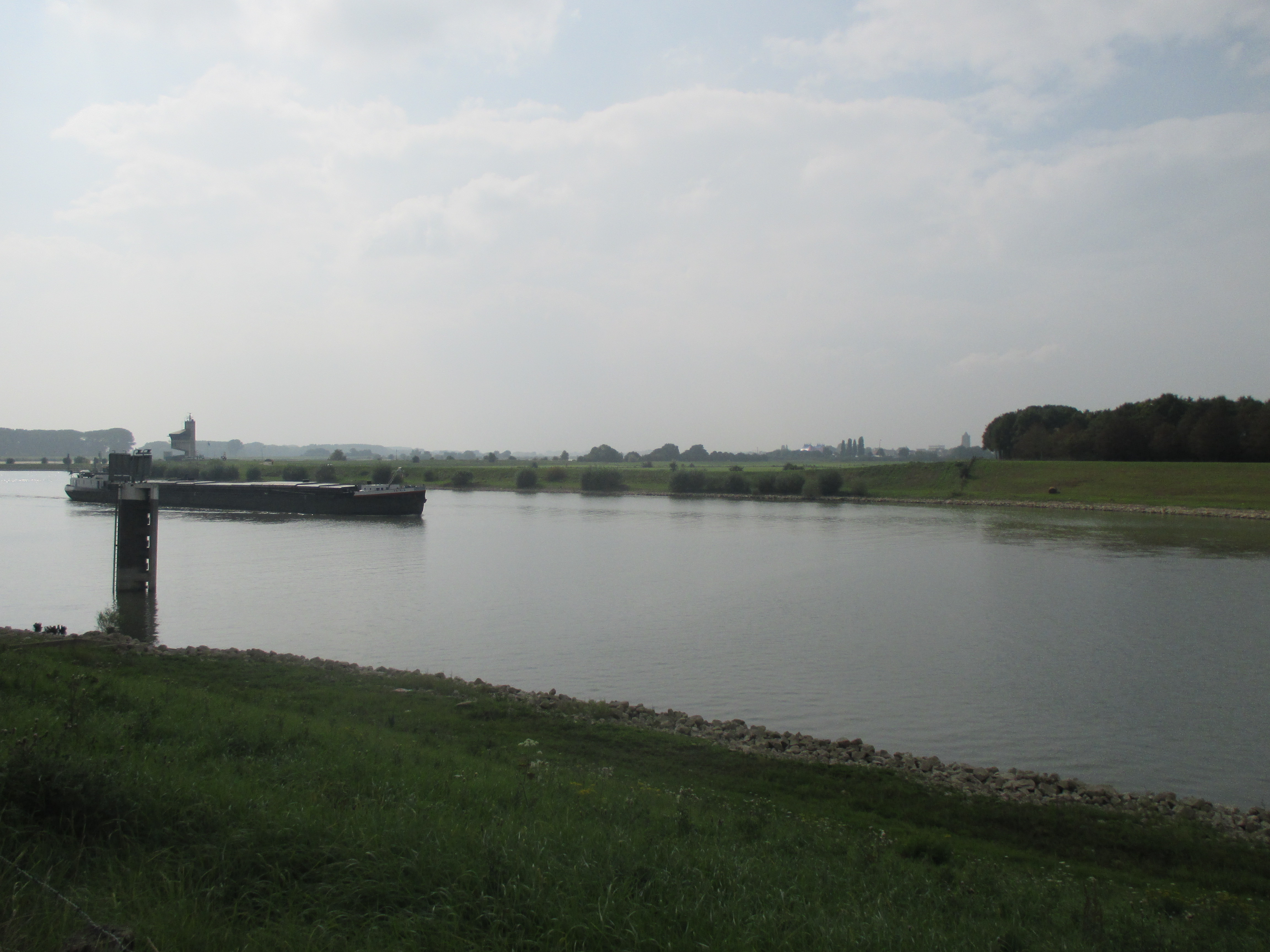 Tiel vanuit het oosten met op de achtergrond de toren van de Sint-Maartenskerk